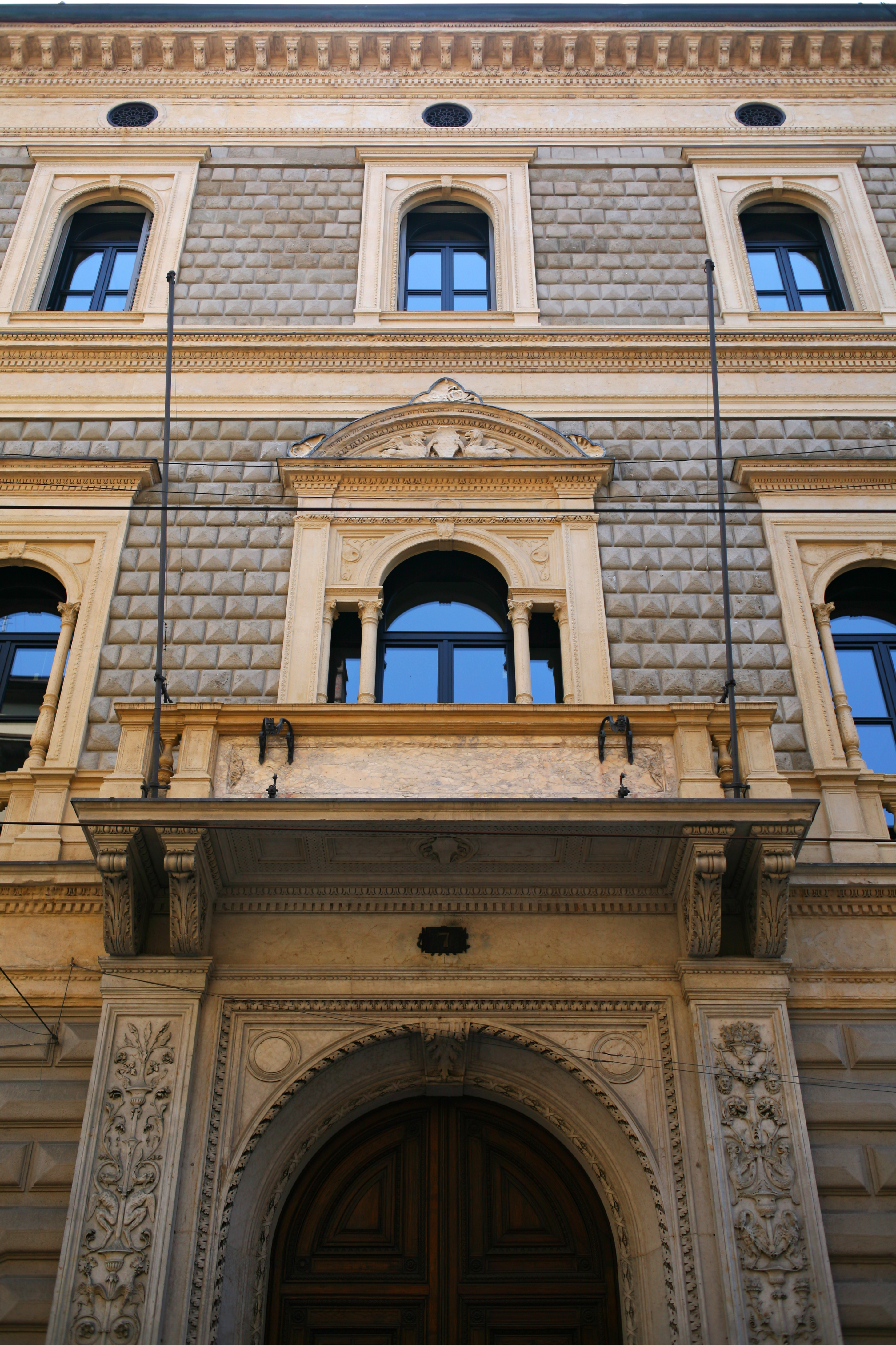 Palazzo Turati, via Meravigli, 7, Milano, veduta prospettica della facciata